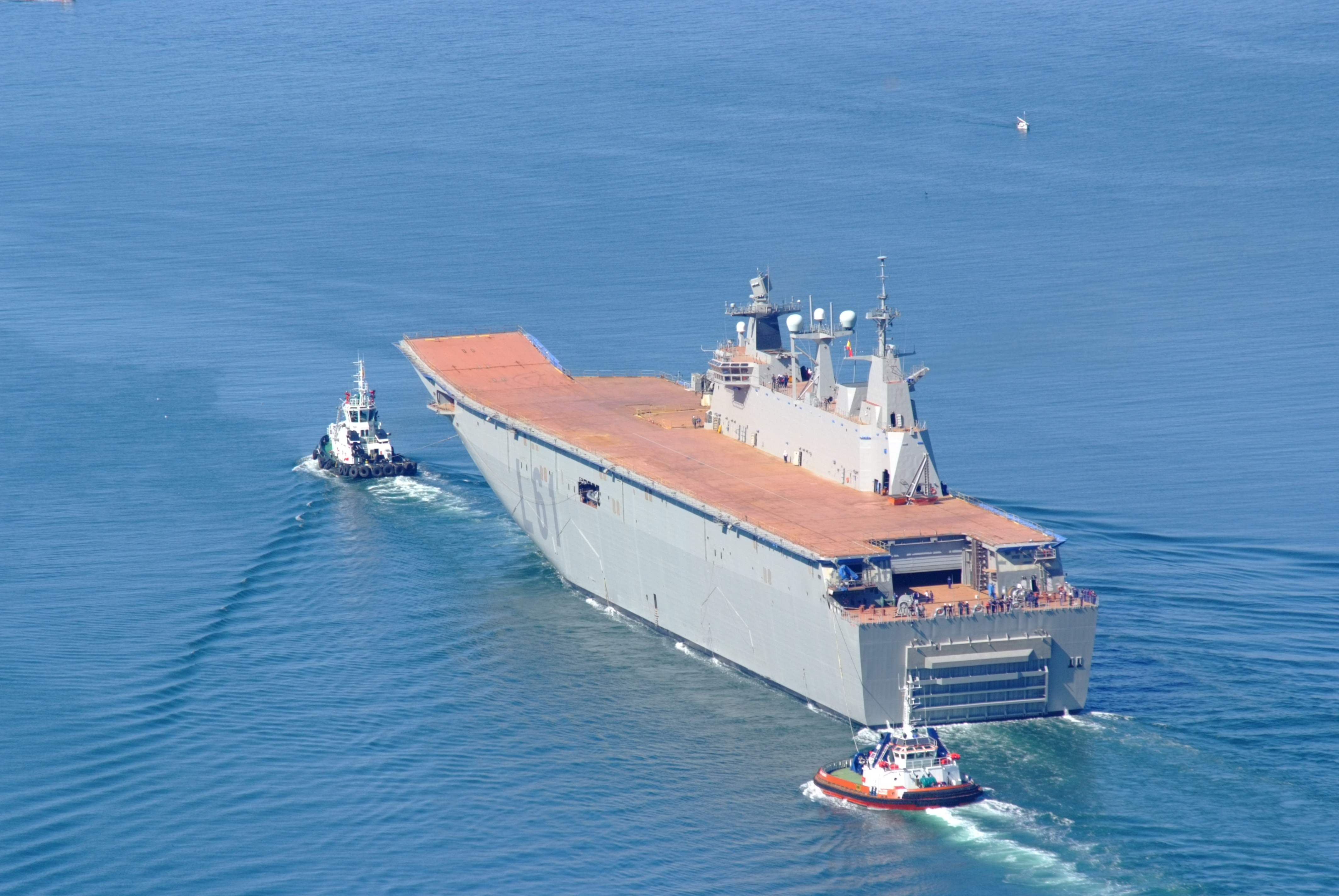 LHD Juan Carlos I (L-61) . Clase Juan Carlos I de la Armada Española, en pruebas de mar a la salida de la ria de Ferrol.